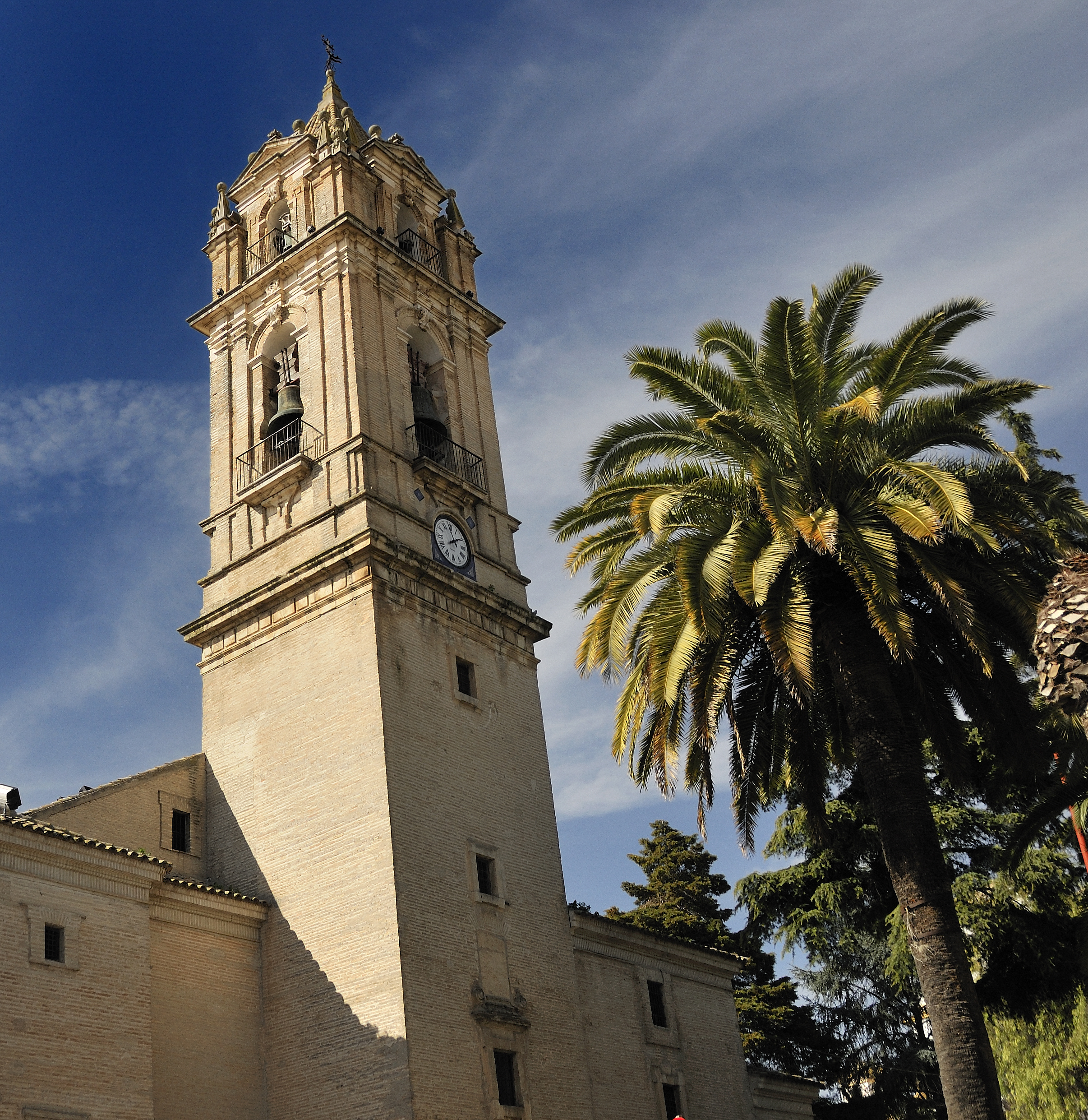 Iglesia de Ntra. Sra. de la Asunción. Cabra. Córdoba.